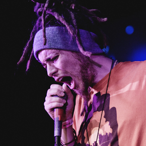 Презентация альбома Eyeopeness 24.04.2011, Москва, клуб "16 Тонн"